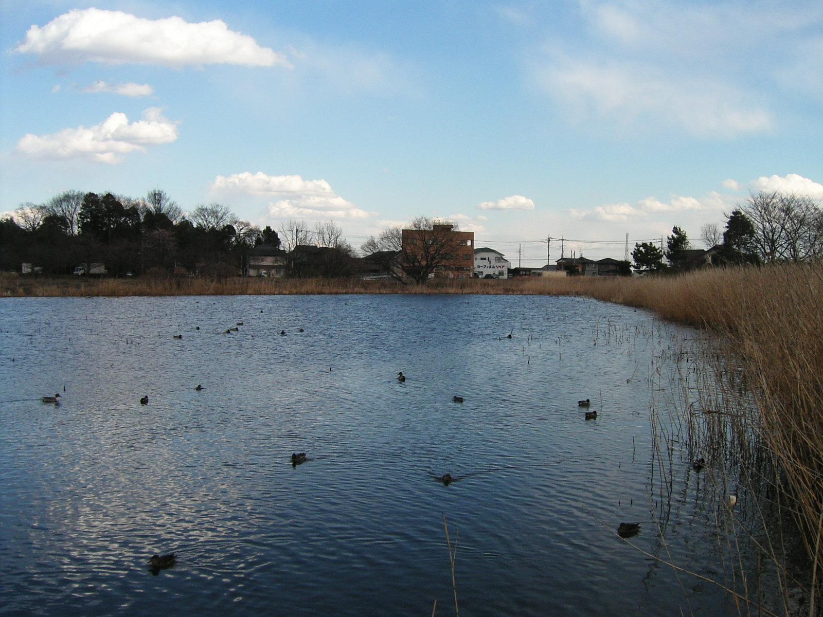 Morinji Numa(swamp) in Tatebayashi city,Gunma pref,Japan 茂林寺沼（群馬県館林市）